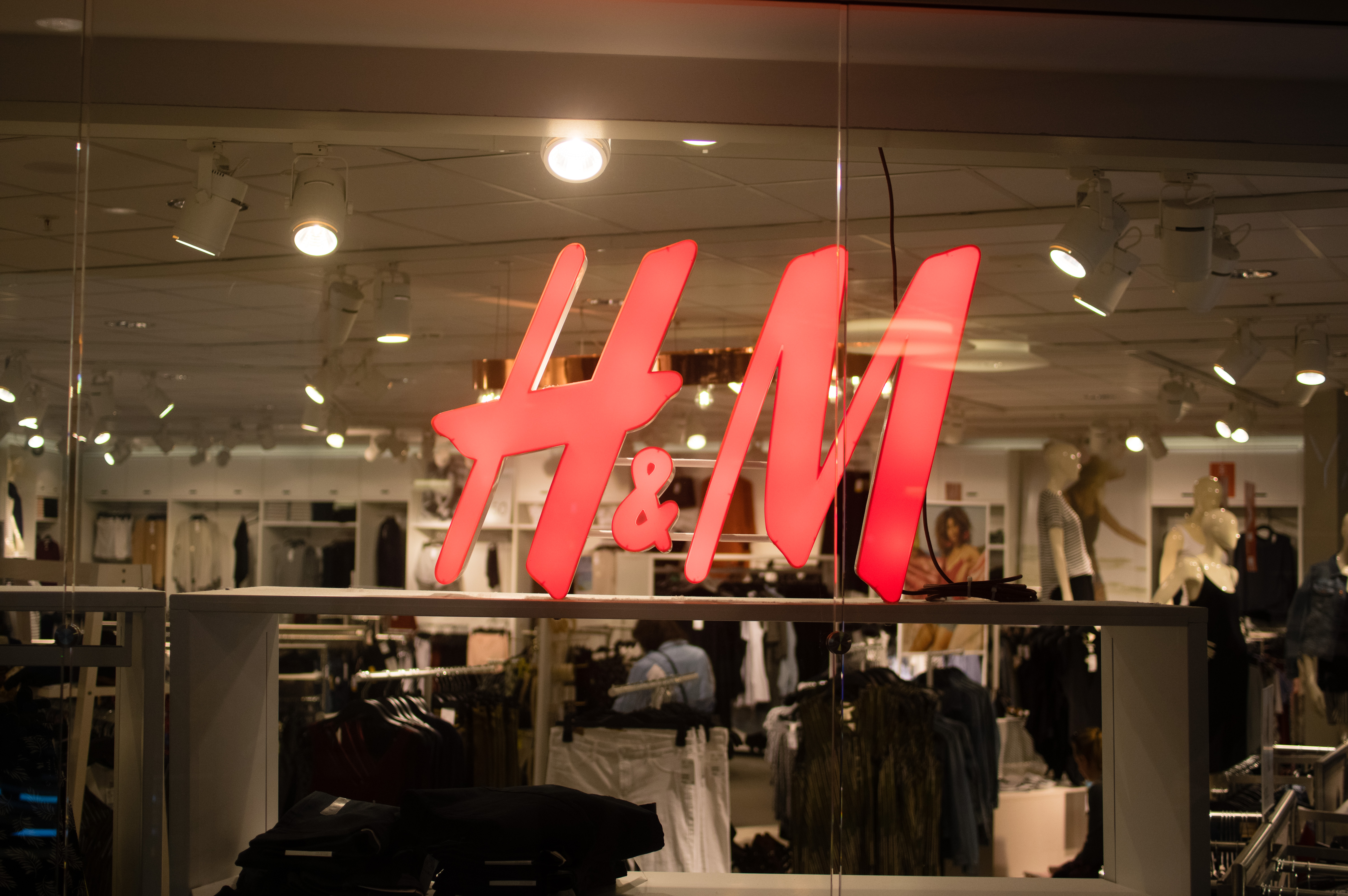 Ein Hennes & Mauritz-butikk i Noreg.